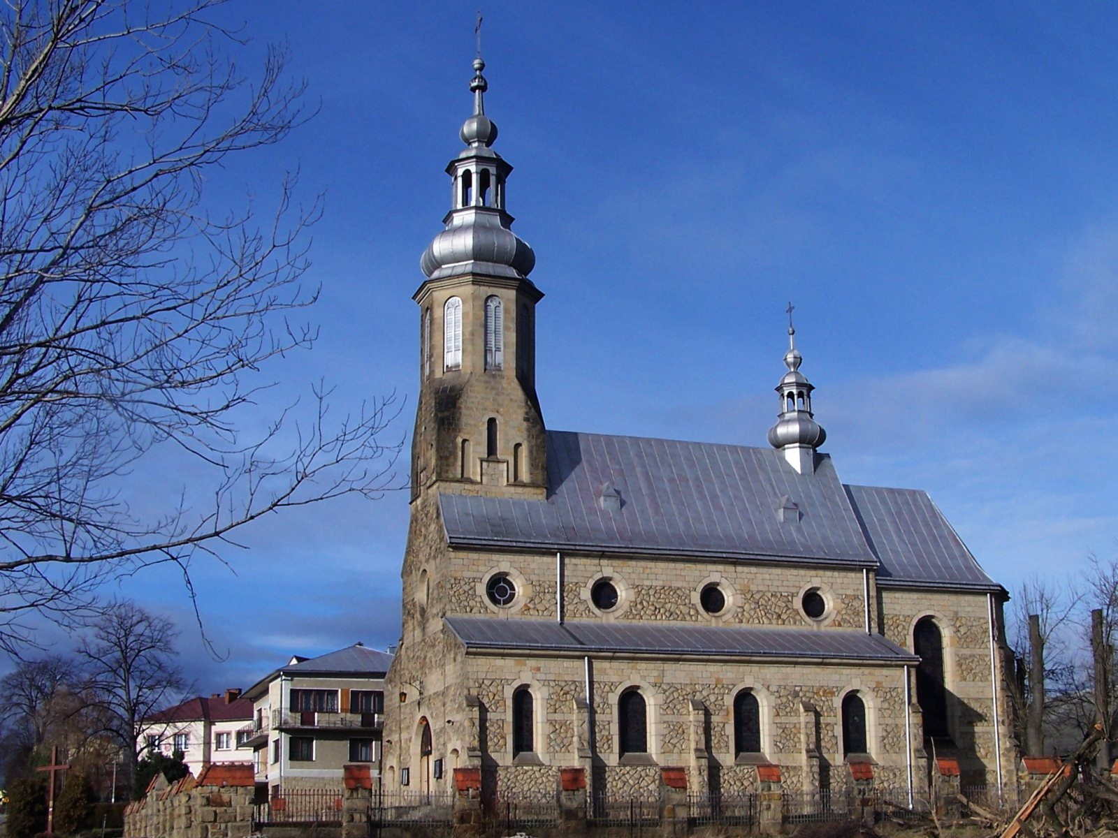 Krasne Lasocice (woj. małopolskie)